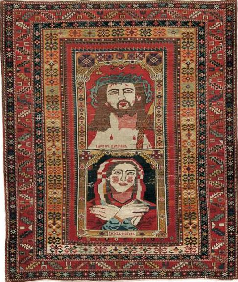 армянский ковер ширван